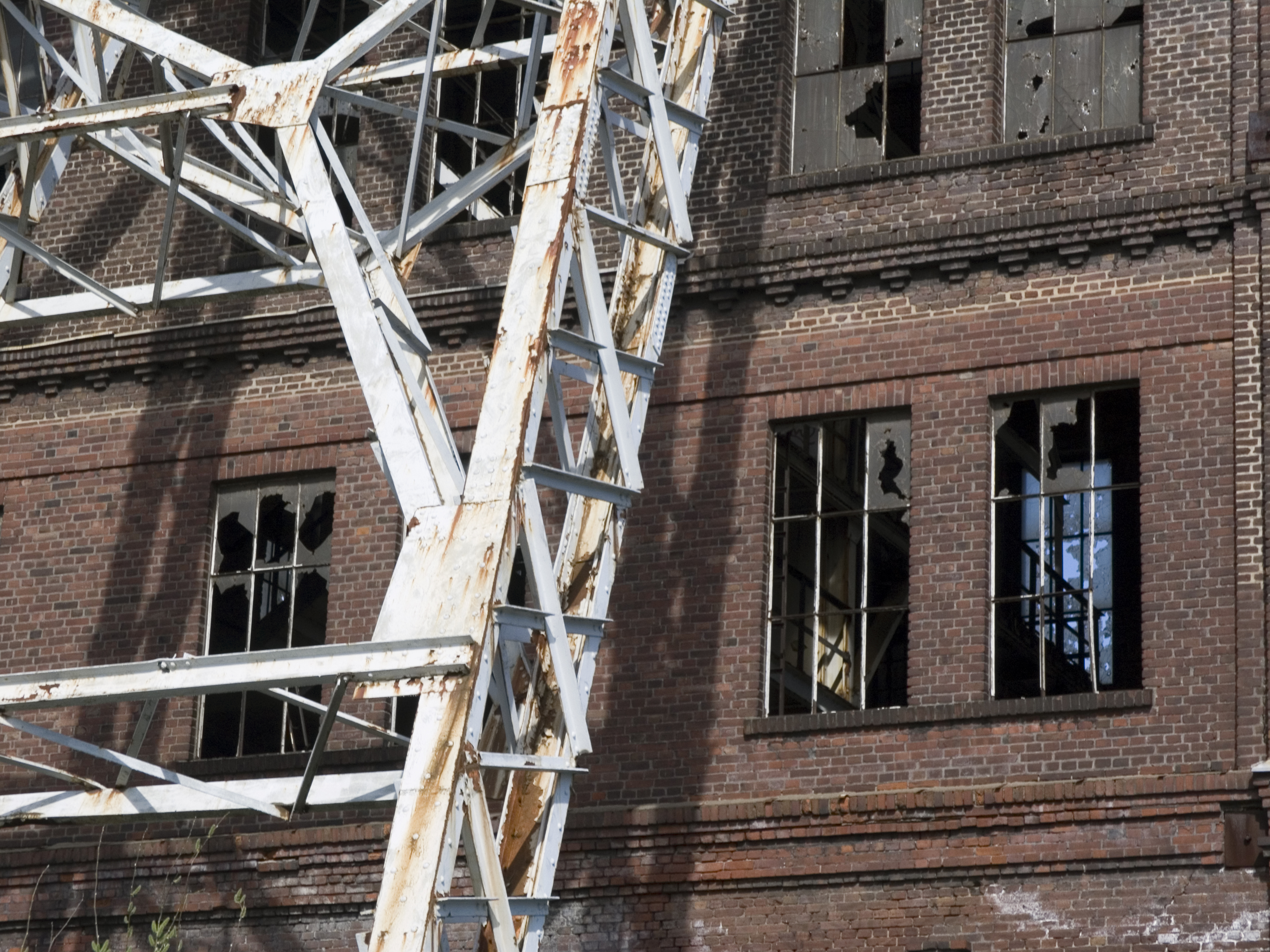 Северный Рейн - Вестфалия, Оберхаузен - шахта Штеркраде